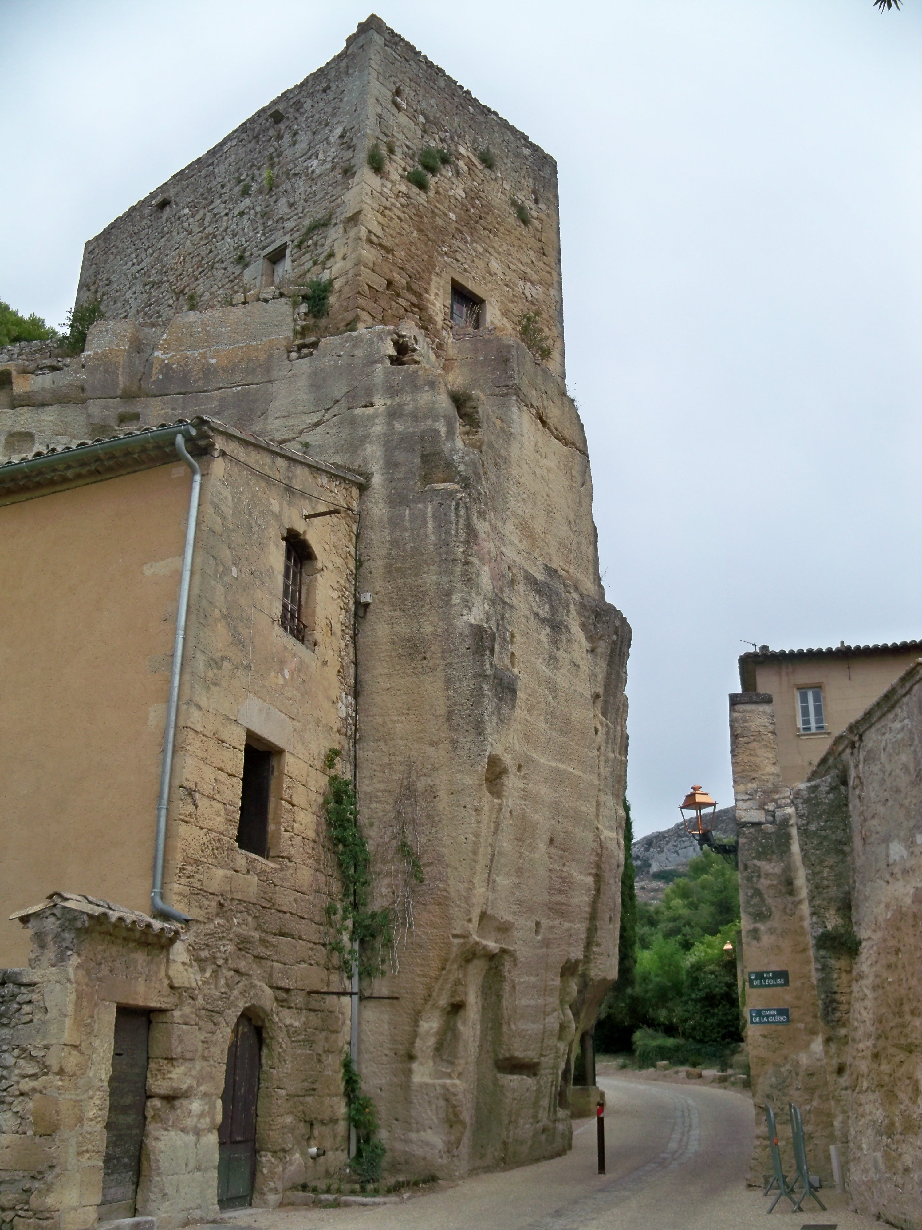 Tour des anciennes fortification aux Taillades, Vaucluse, France